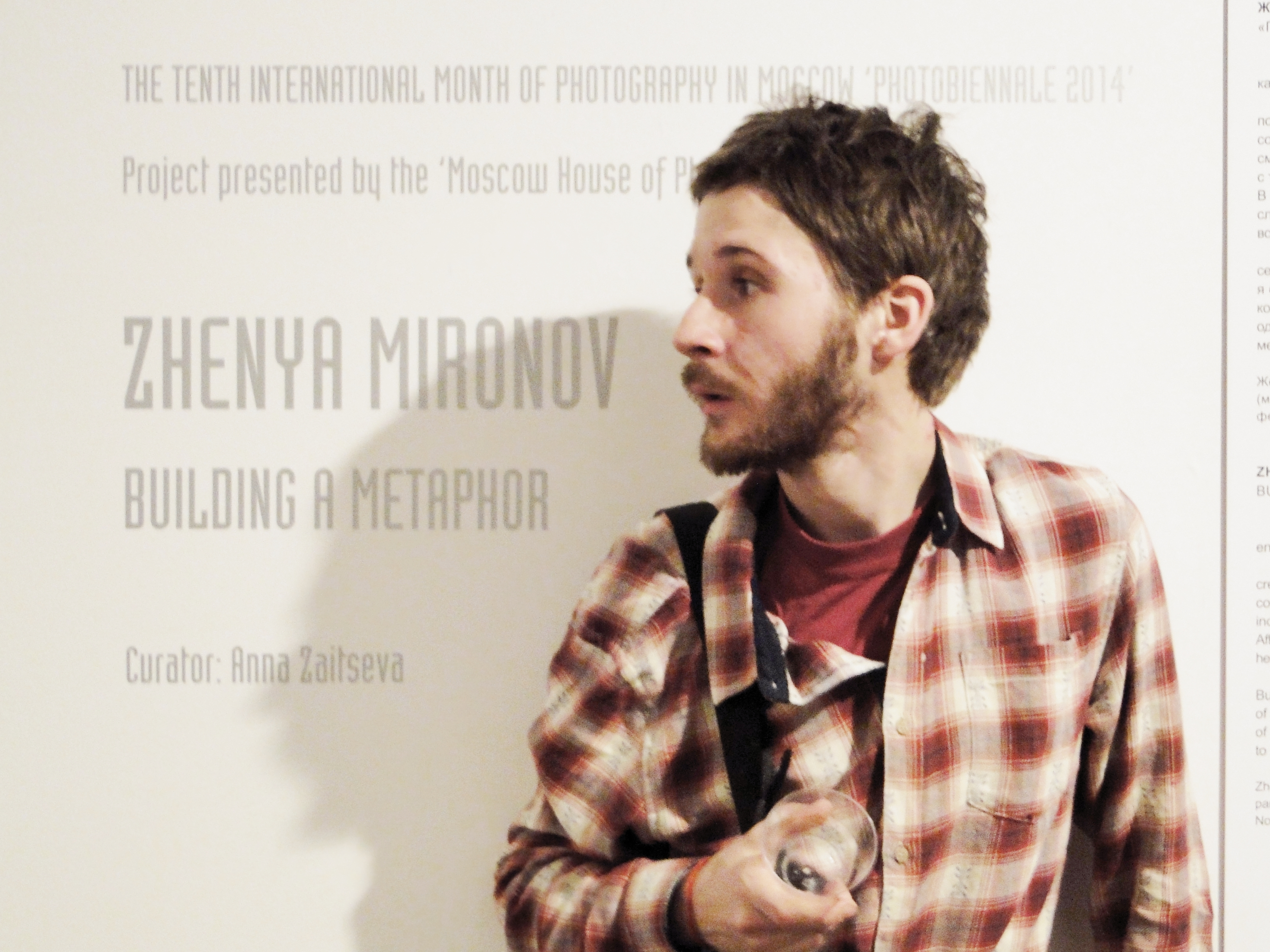 Выставка в ММСИ